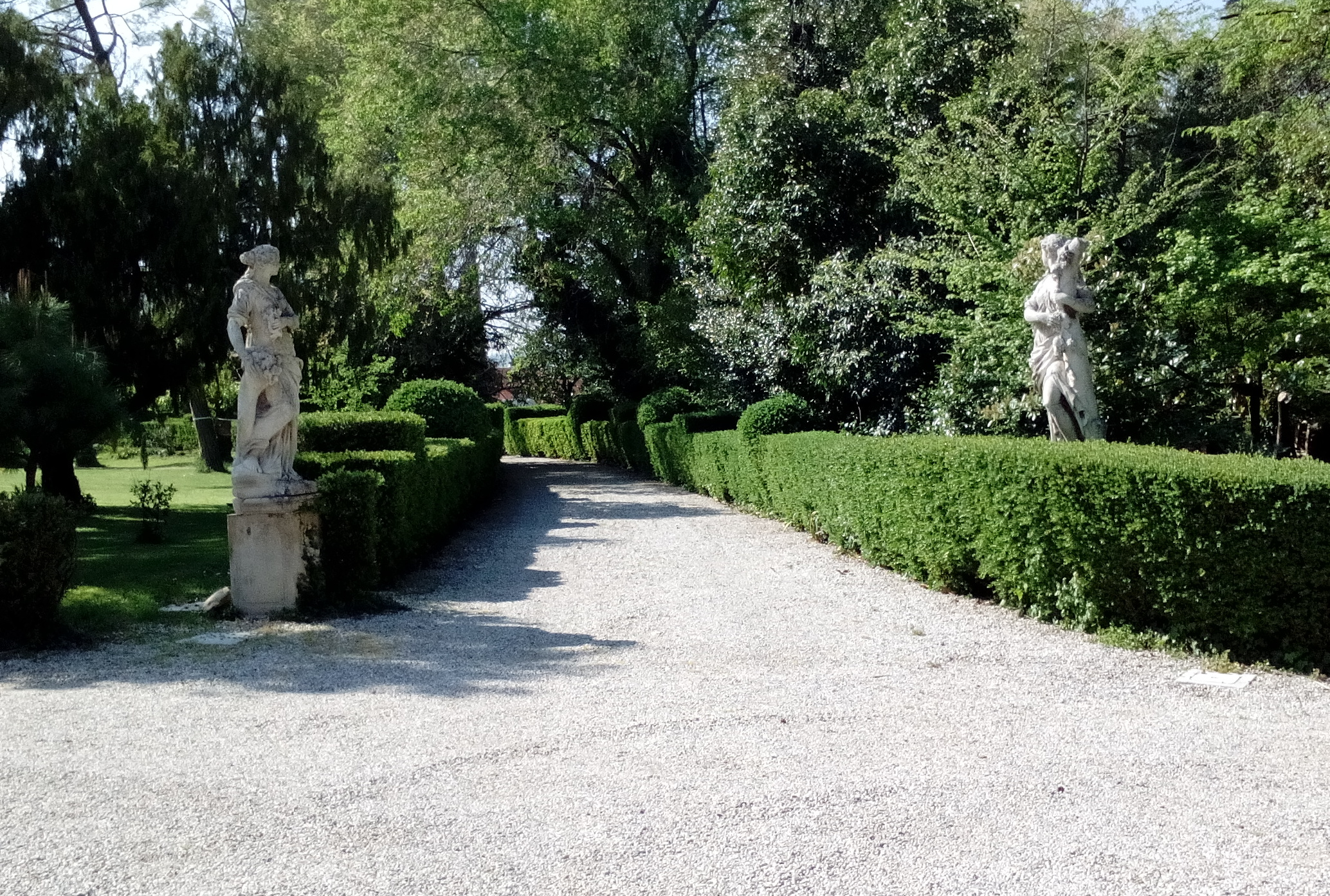 Ingresso del parco della villa Acquistapace a San Pietro in Cariano, provincia di Verona